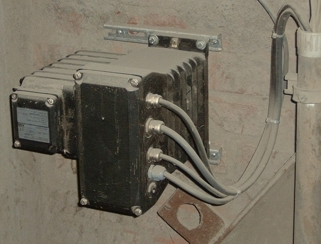 Separat installierte Leistungselektronik bei rauen Umgebungsbedingungen